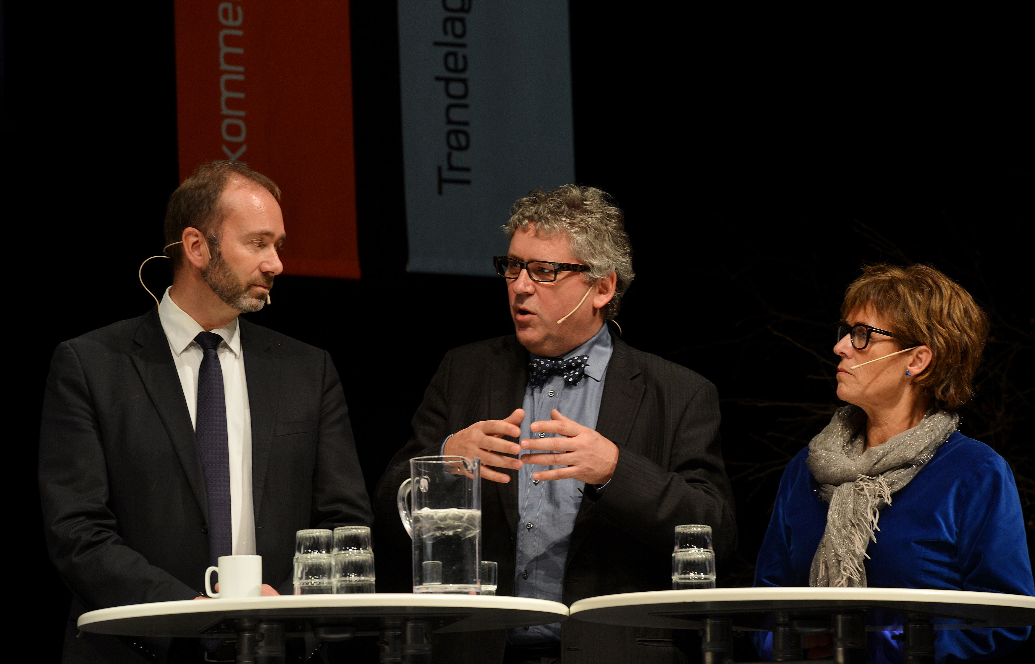 Trond Giske, Erik Haugane og Merethe Storødegård på Trøndelagsmøtet 2013.